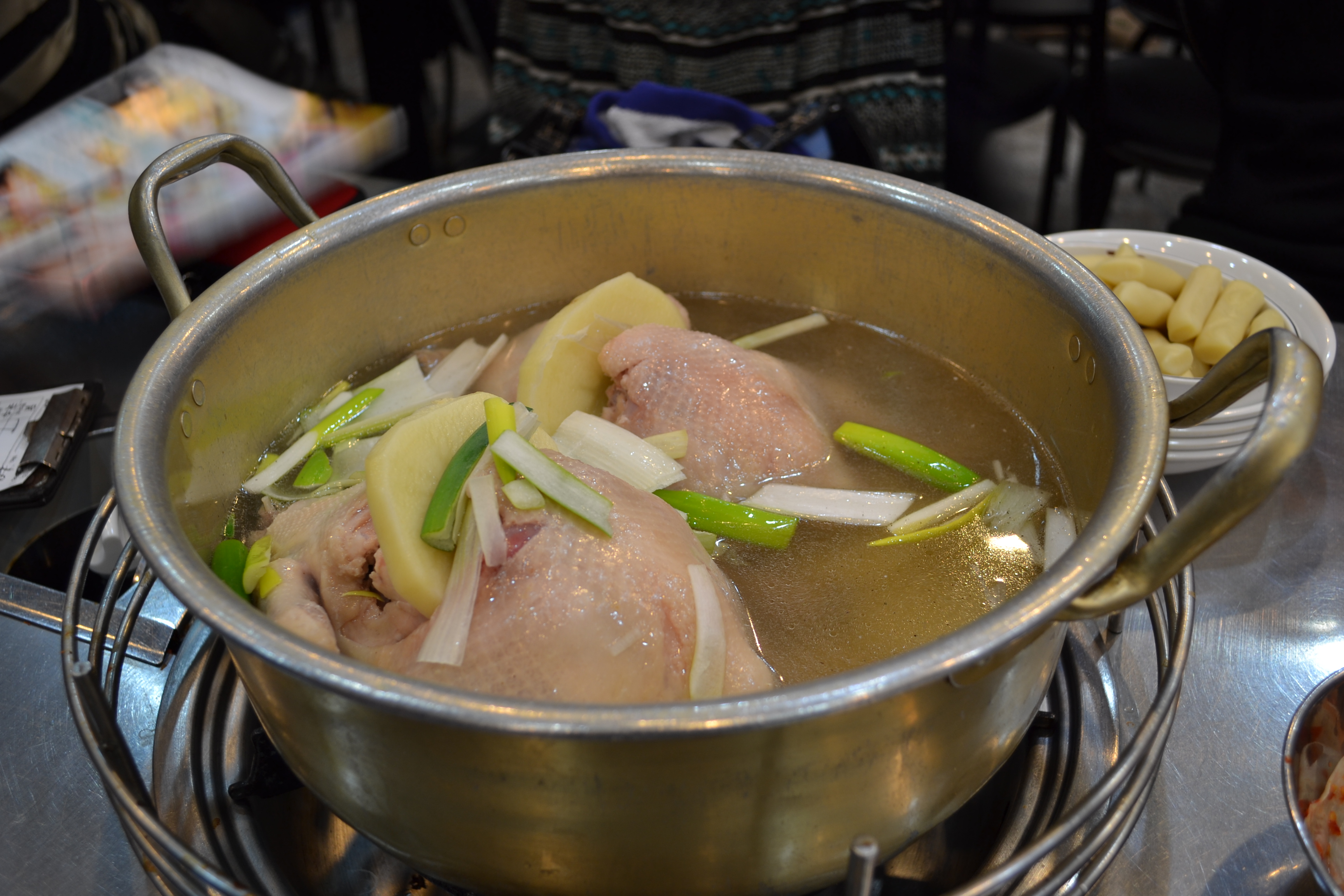 2011年に韓国で撮影したタッカンマリ